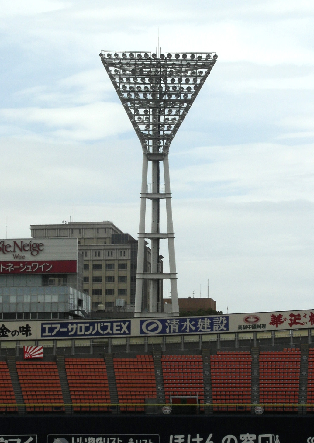 Yokohama Stadium